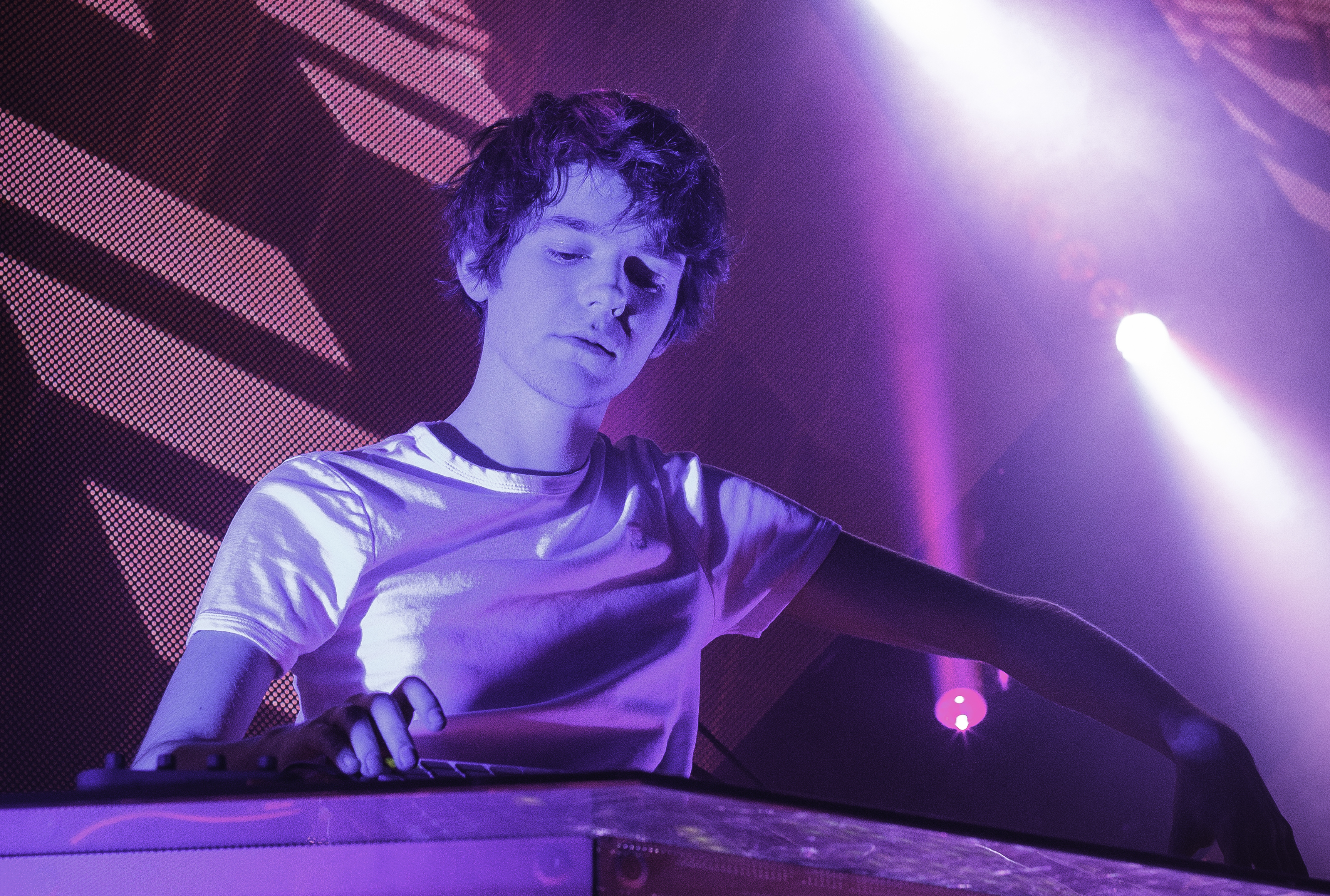 Madeon, Brussels Live, 04 april 2015